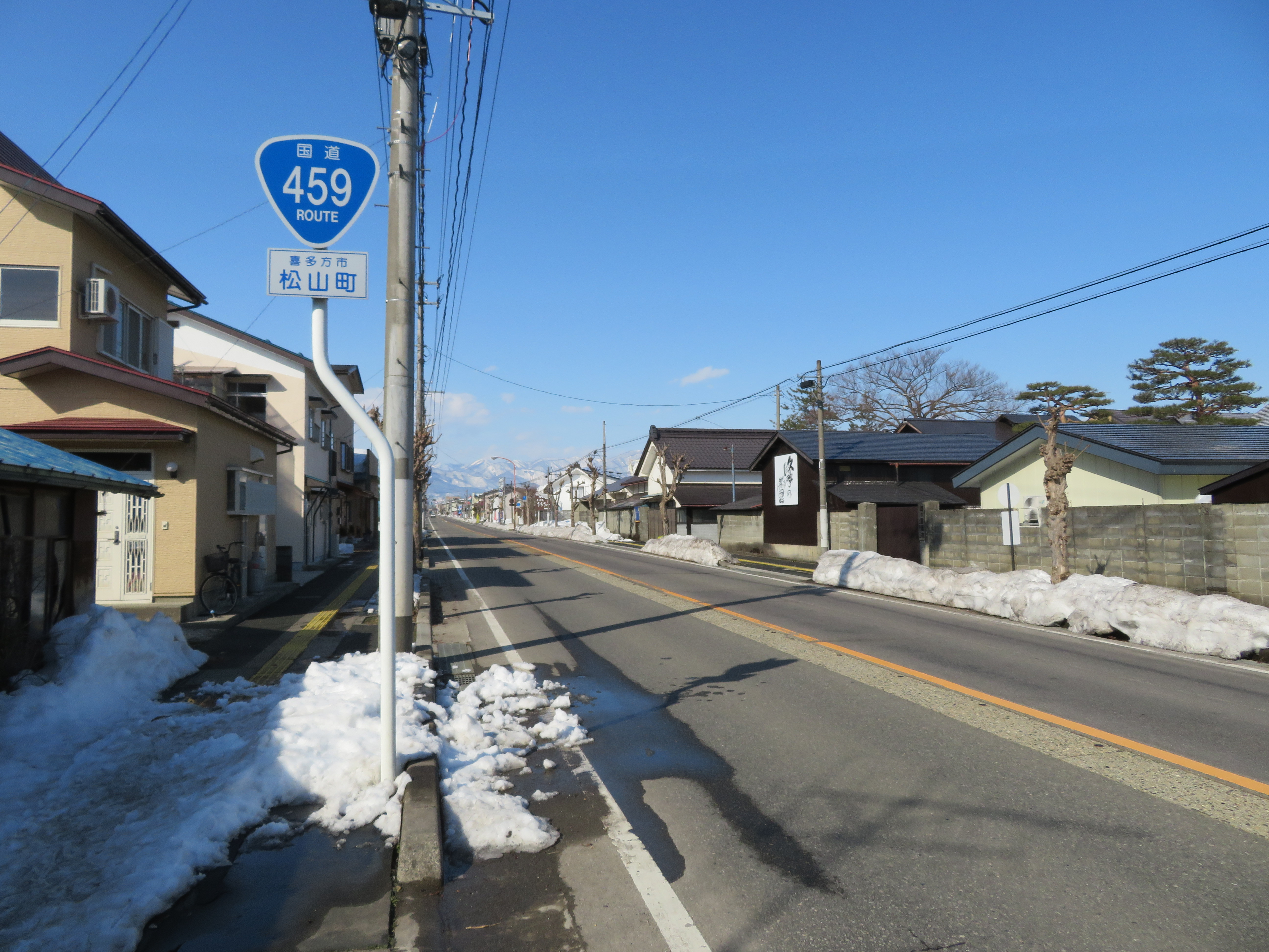 国道459号線福島県喜多方市松山町付近（西会津方面を撮影）